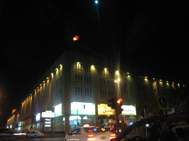 Riyadh, Saudi Arabia